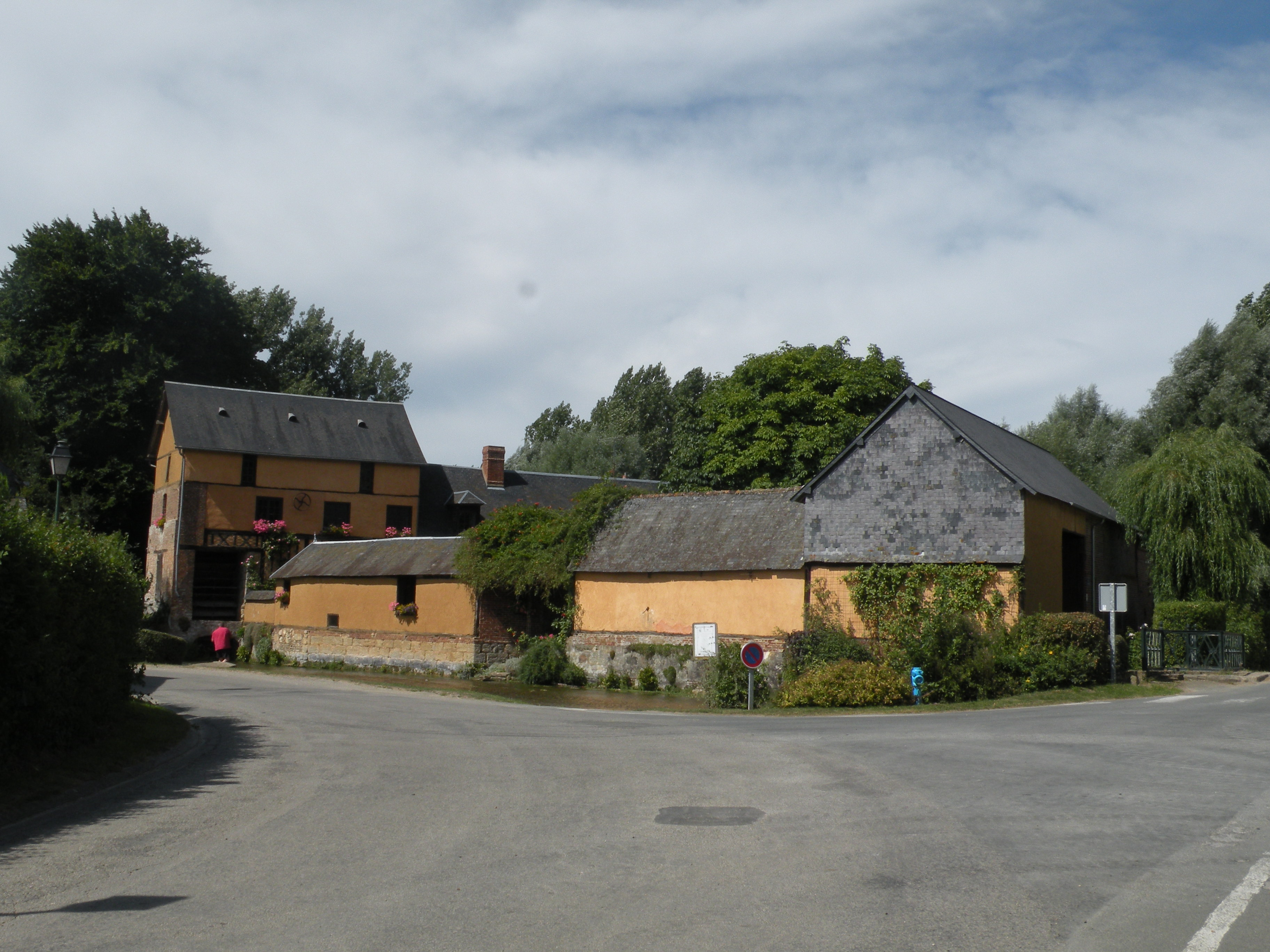 Moulin Vertu (Roy-Boissy)